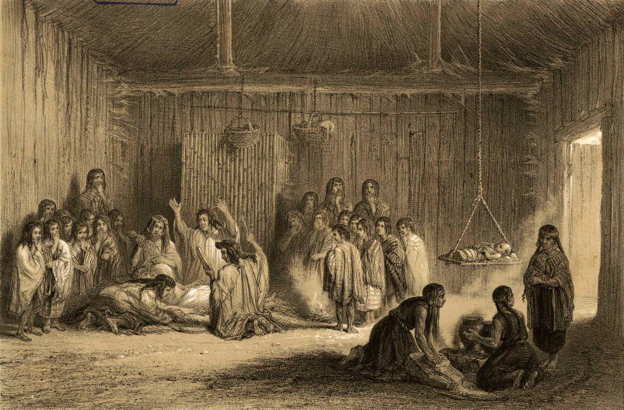 El machitún es una ceremonia de sanación del pueblo mapuche, llevada a cabo por una machi.